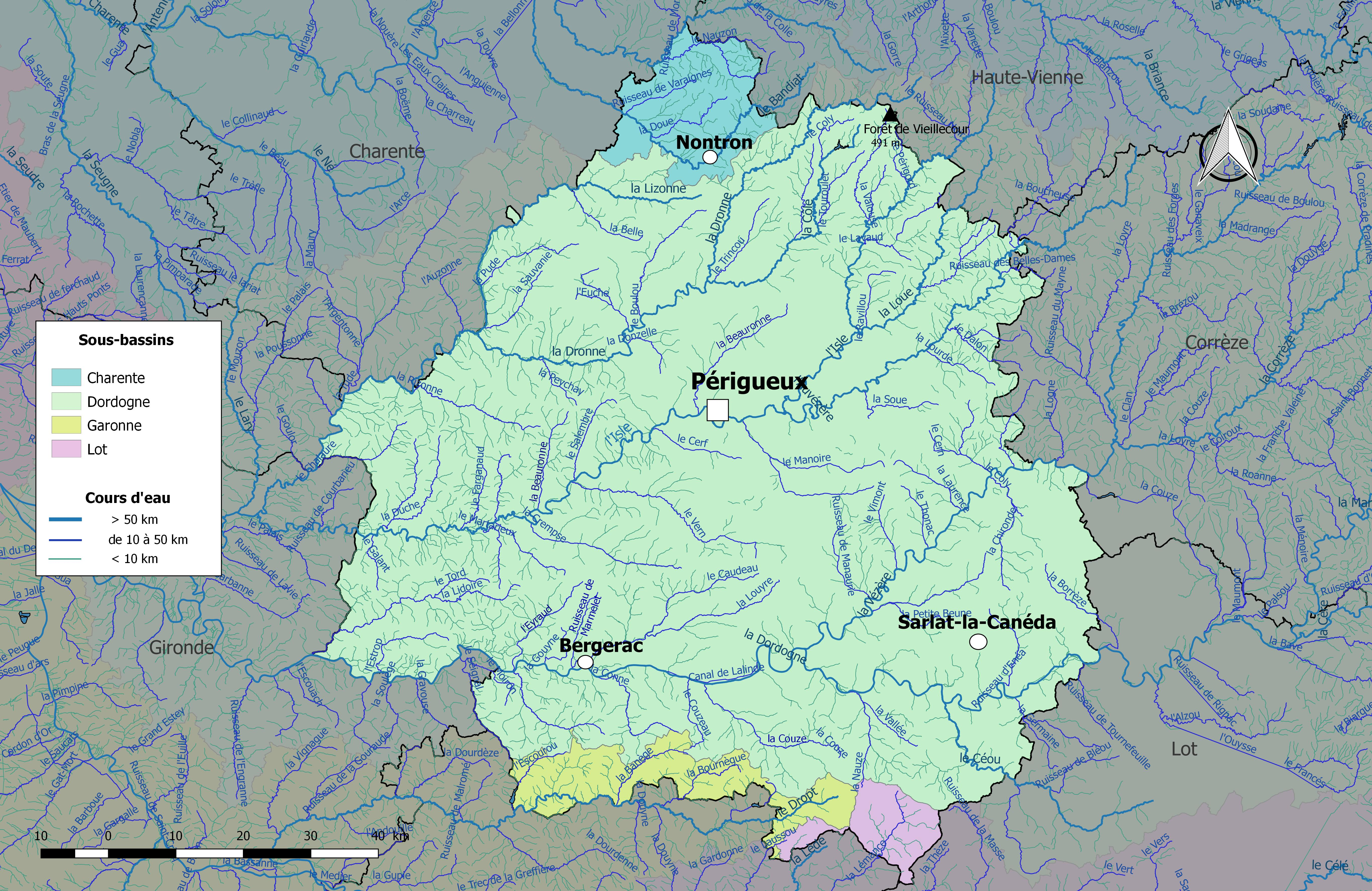 Carte du réseau hydrographique du département de la Dordogne (France), avec représentation des sous-bassins administratifs.